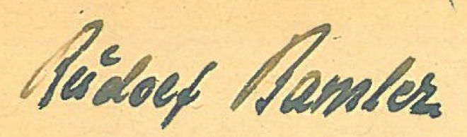 Vergrößerung der Unterschrift Rudolf Bamlers aus seinem Lebenslauf. Dieser ist abgelegt unter dem Gz: MA4-2012/D-9951 im Militärarchiv Freiburg/Breisgau.